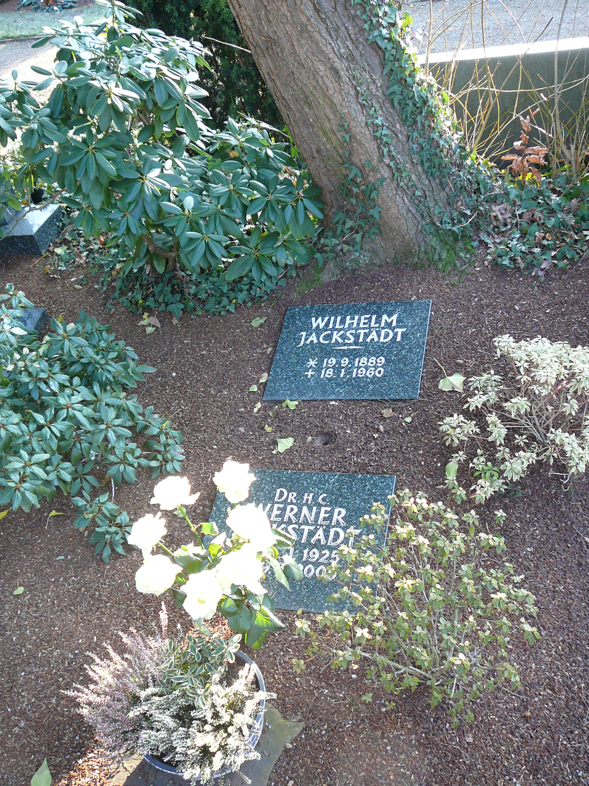 Kirchhofstraße, Wuppertal